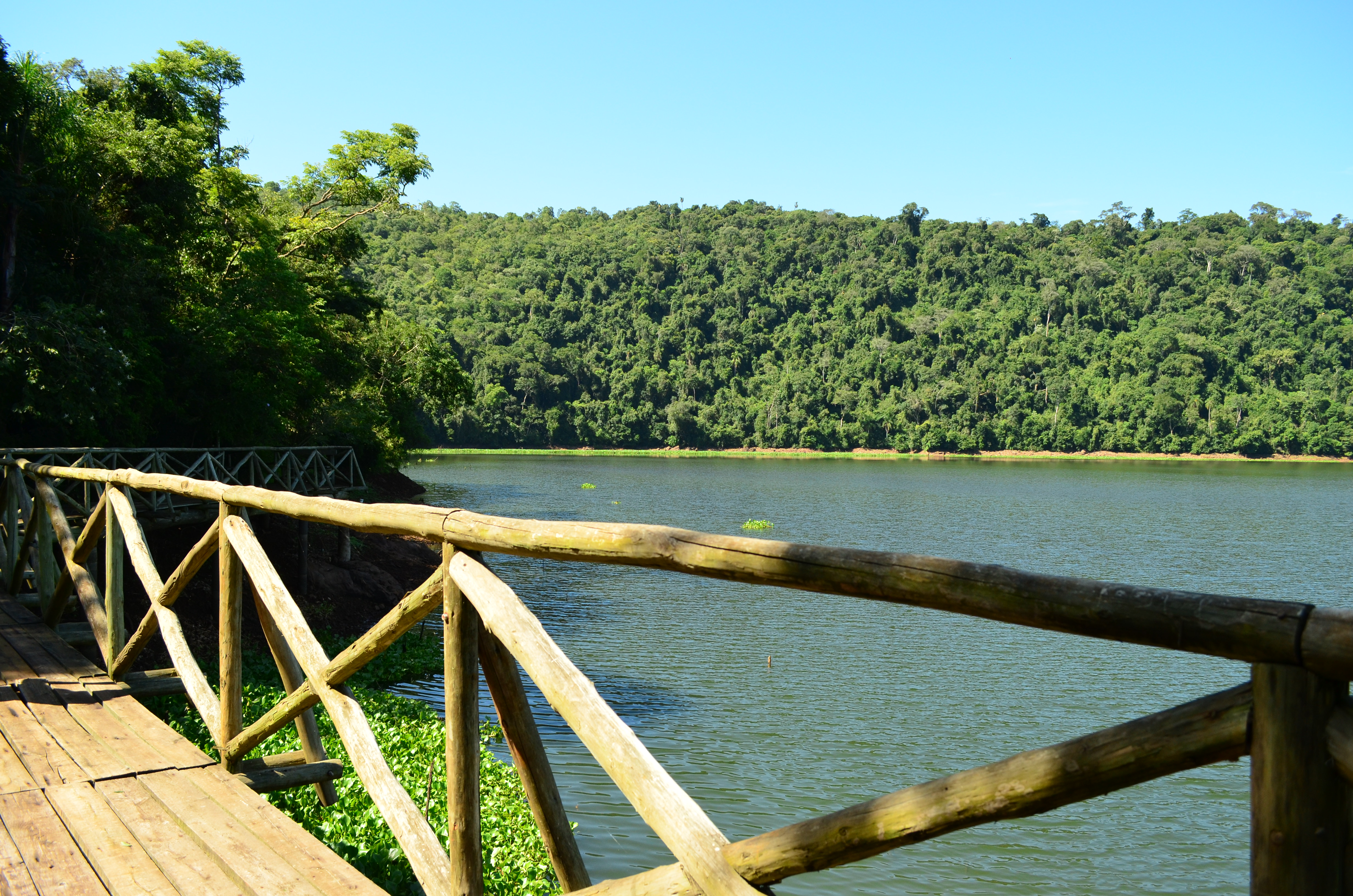 A passarela fica sobre o reservatório da Usina de Itá, ali, podemos observar as árvores do parque e a grandiosidade da intervenção do homem. É possível perceber que alguns animais curiosos pulam de galho em galho para observar os visitantes.